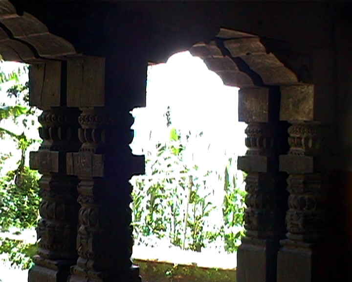 नेपाली: कलात्मक थाम